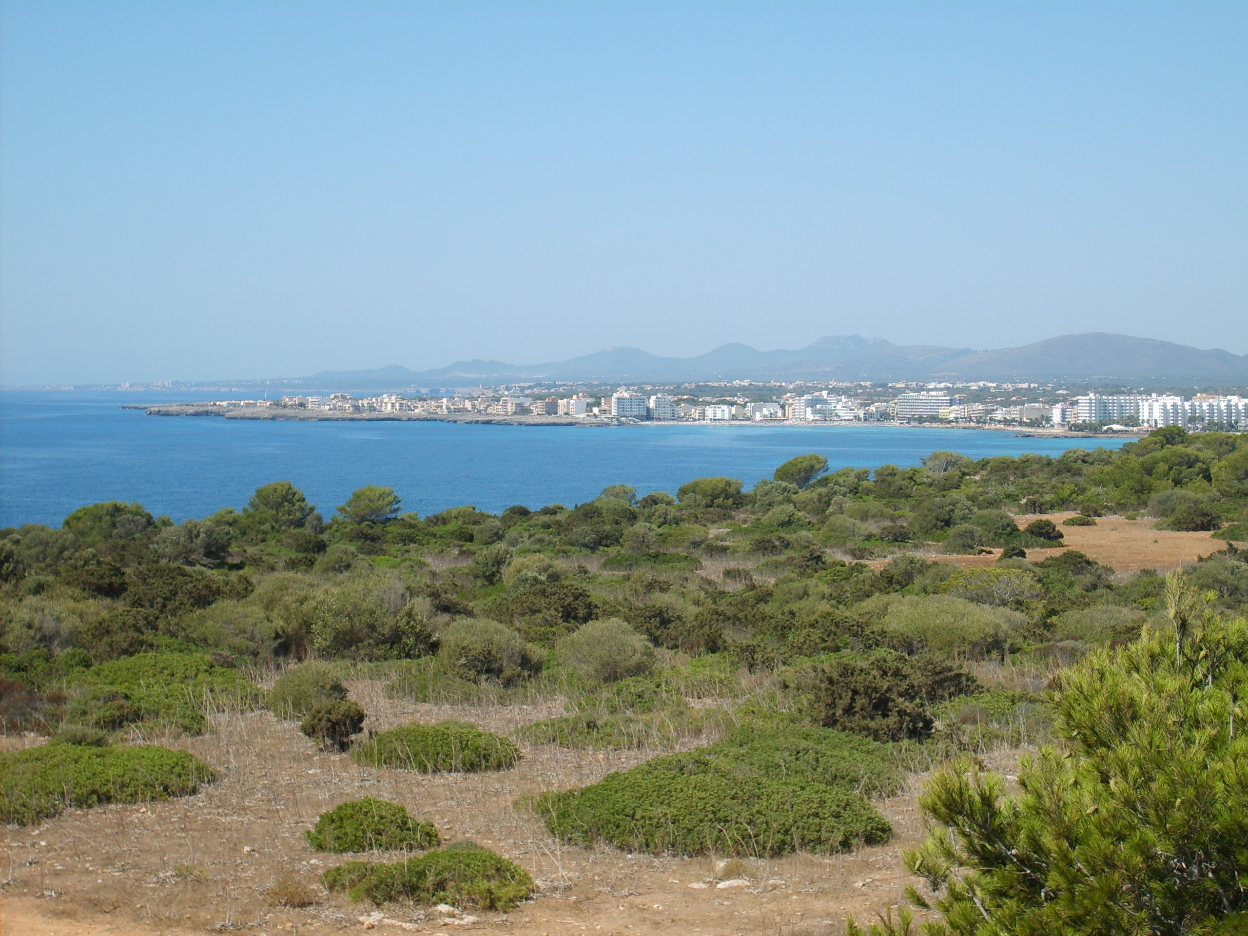 Blick auf die Bucht von S´illot und Sa Coma